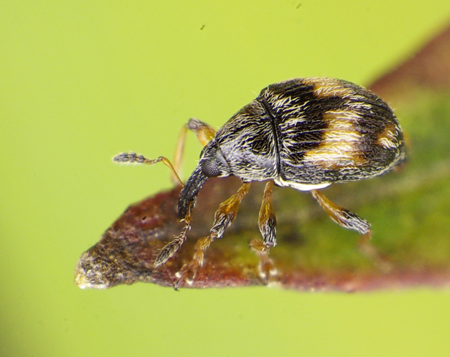 Nanophyes marmoratus aus Baden-Württemberg, zwischen Tuttlingen und Rottweil, 700 m hoch, neben Gartenteich, auf Blutweiderich